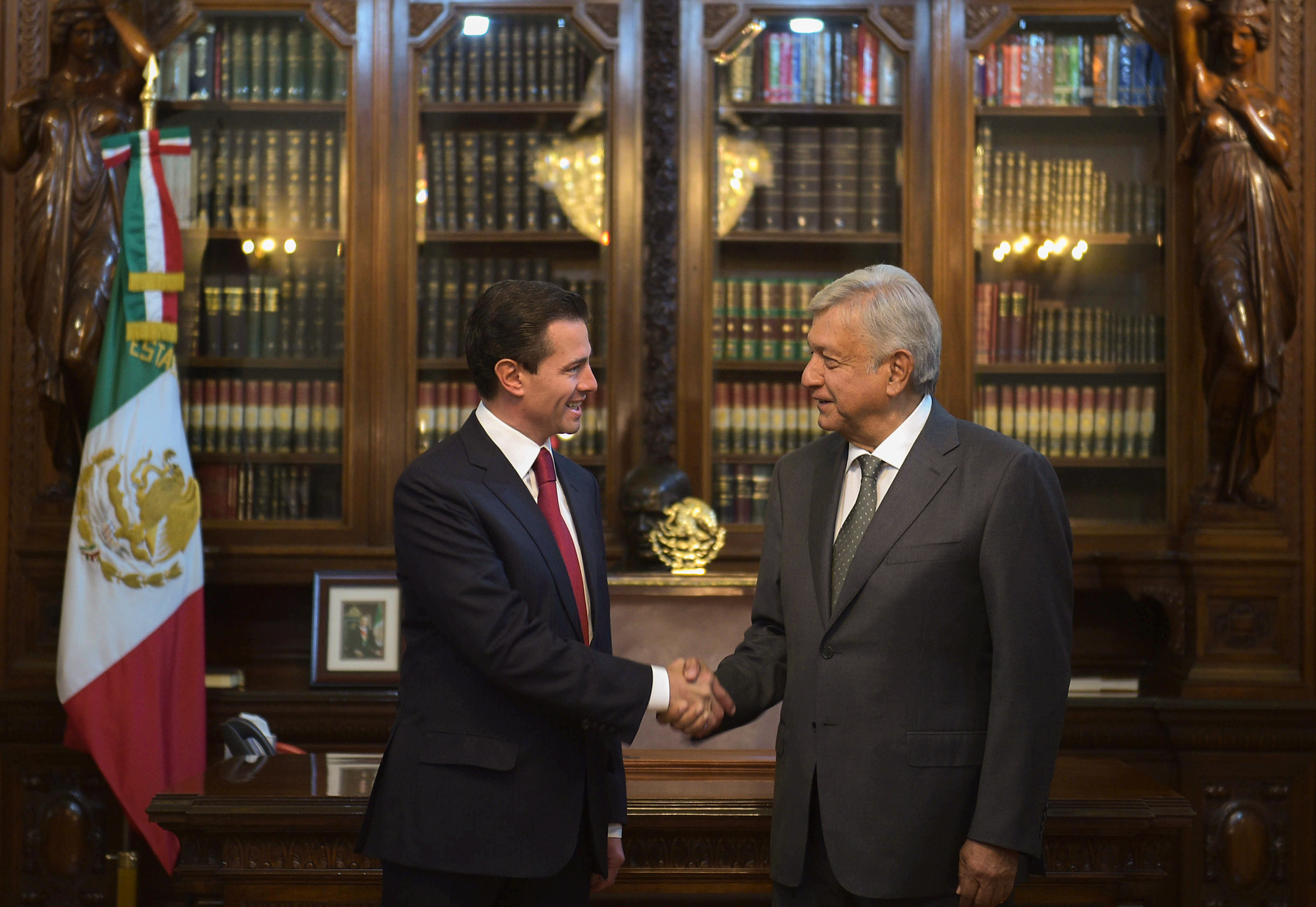 Reunión Peña Nieto-López Obrador en Palacio Nacional el 3 de julio de 2018.